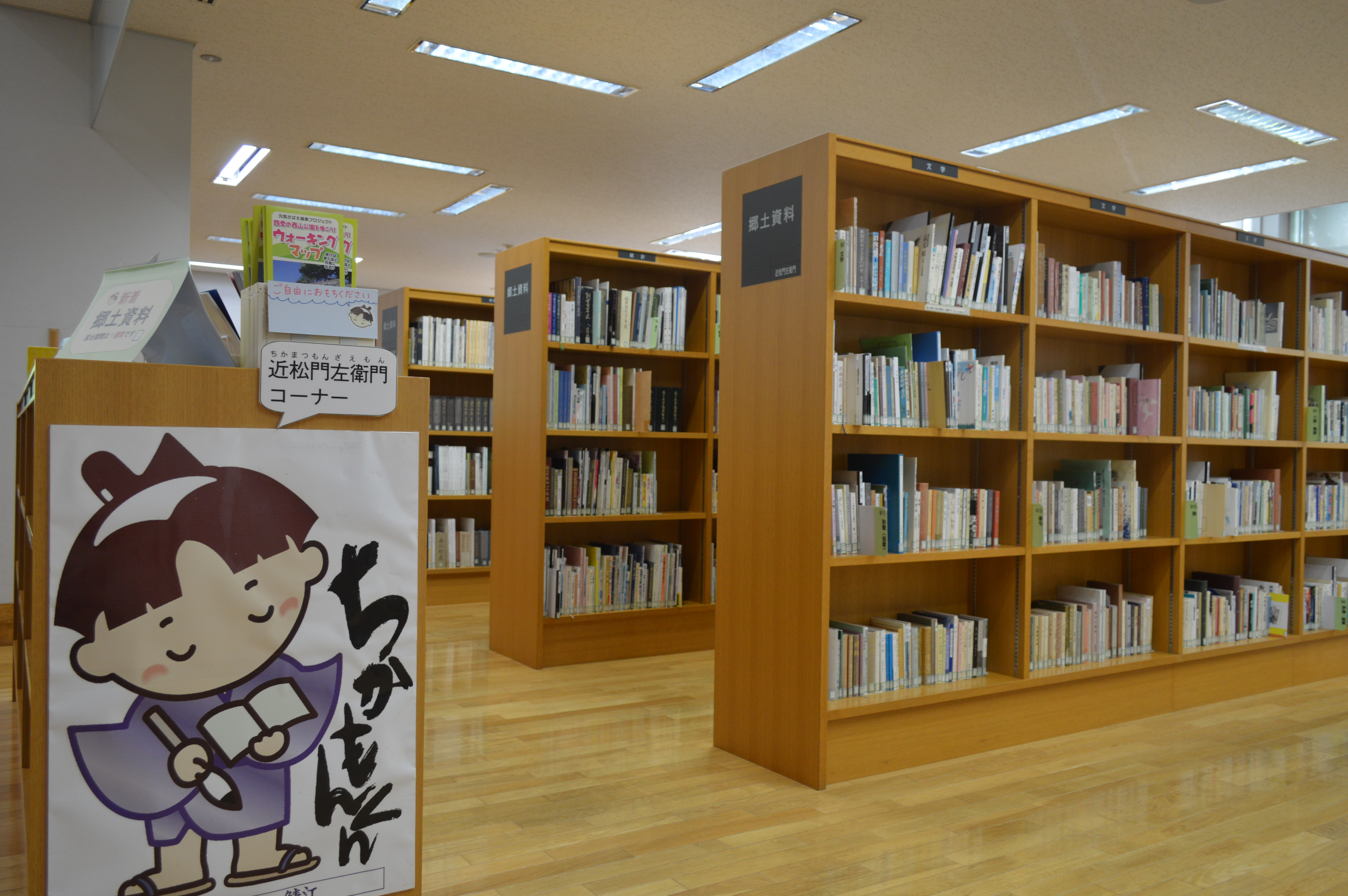 鯖江市図書館1階。郷土資料コーナーと近松門左衛門コーナー。